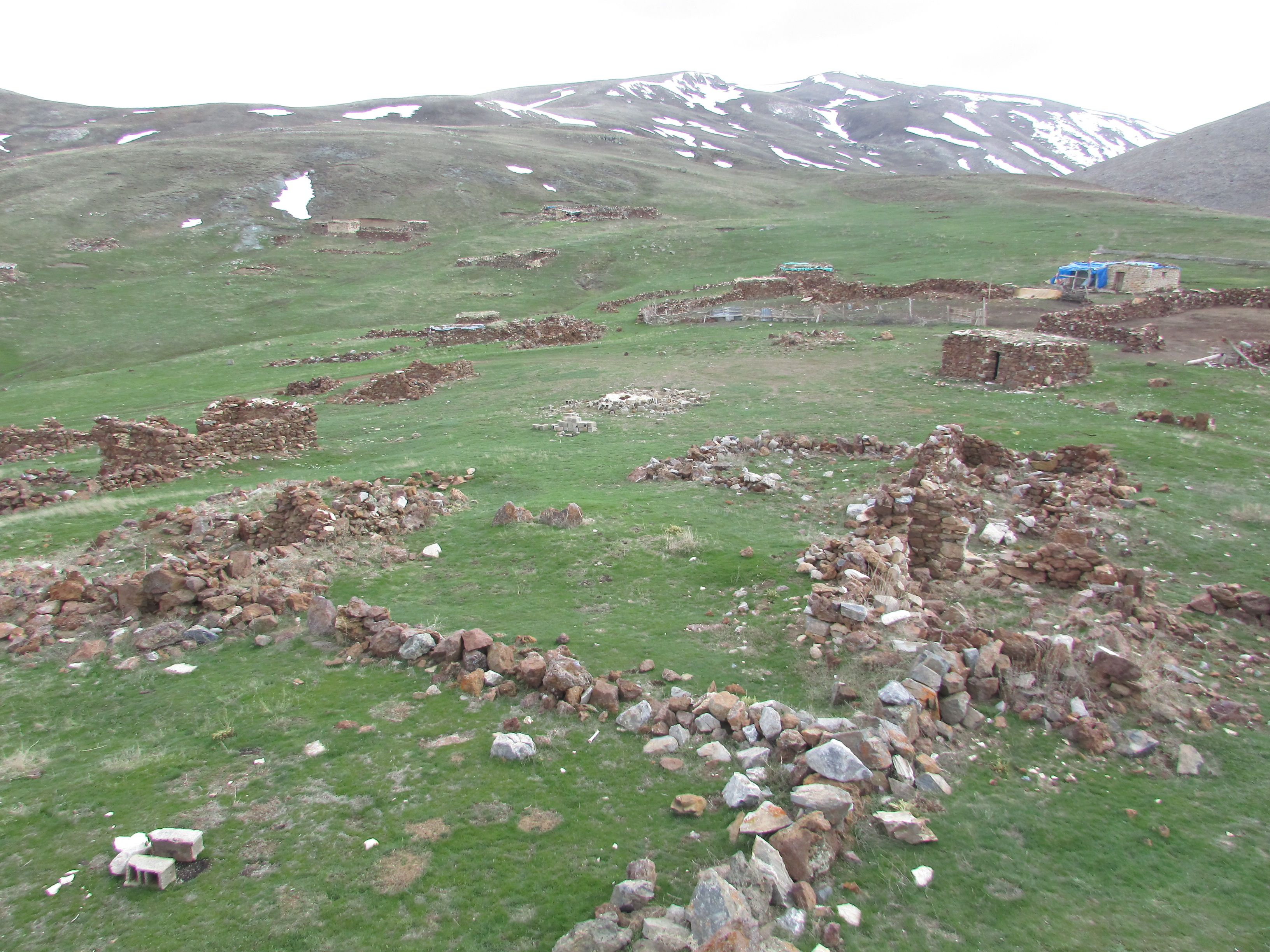 Nisan Ayında Manavuz Yeşiltaş Yaylası